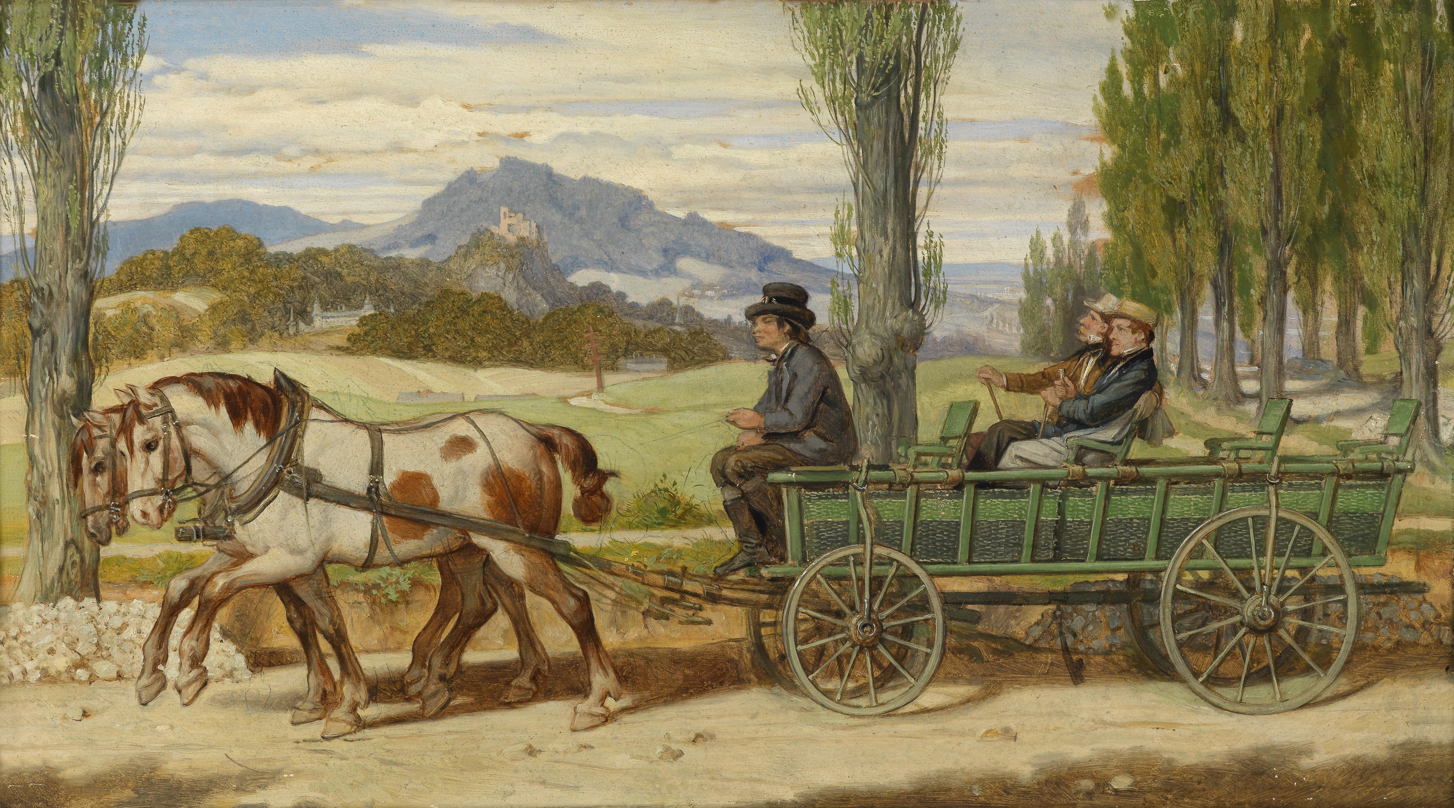 Die Landpartie: Schwind und Bauernfeld auf einem Leiterwagen